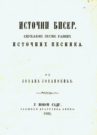 Насловна страна првог издања Змајеве збирке „ИСТОЧНИ БИСЕР“ из 1861.